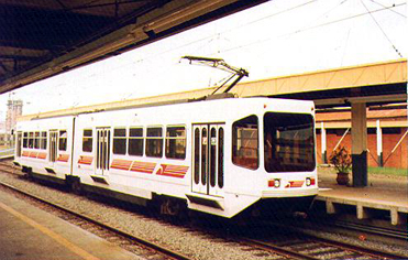 Composição da Série 5700 da Fepasa, utilizado no VLT de Campinas parada em estação.